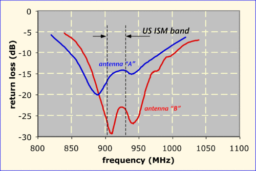 Comparación entre dos antenas: la antena "A" con un parche de 2×2 dm y la antena "B" con 3×3 dm. Puede observarse cómo varía el ancho de banda y la pérdida de retorno según va aumentando la frecuencia.